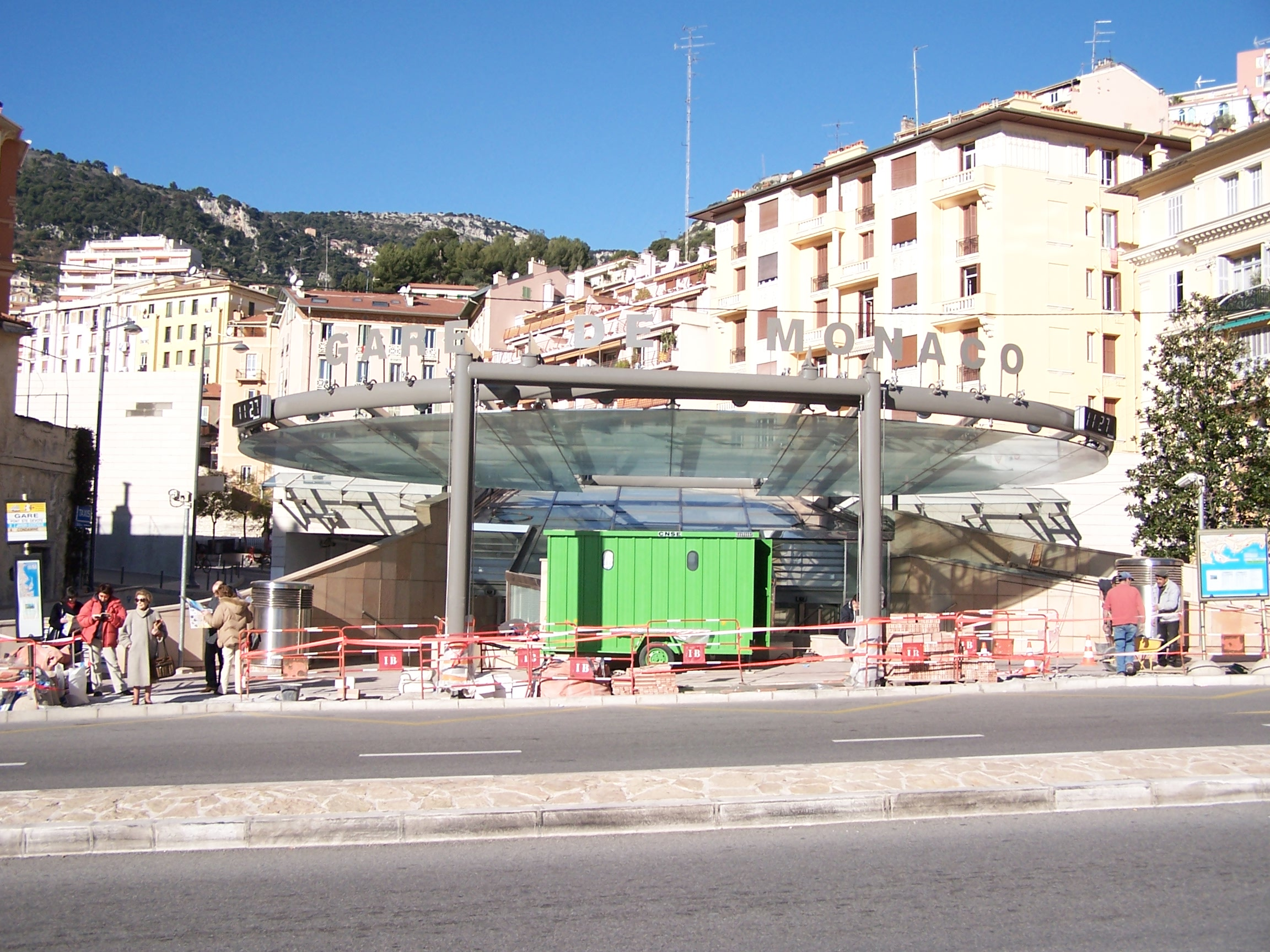 Façade en travaux de la gare de Monaco-Monte-Carlo (janvier 2006).